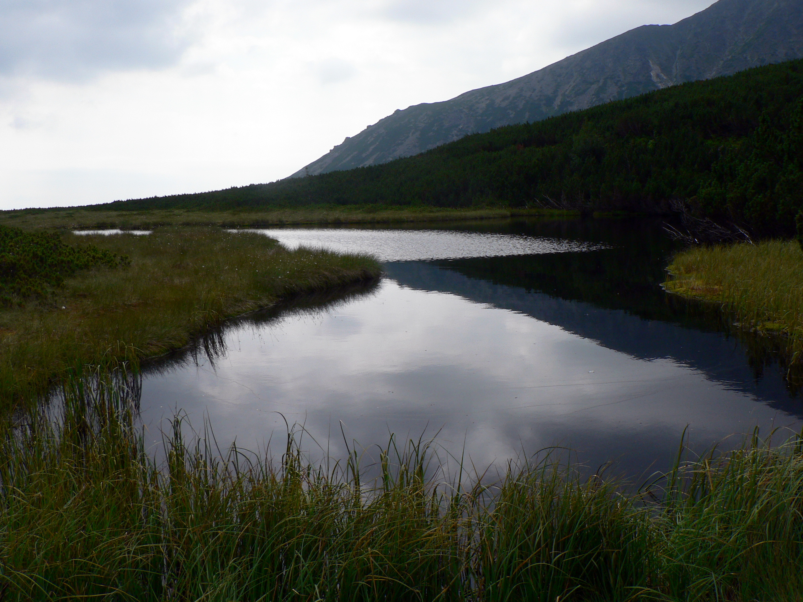 Stręgacznik z Magistrali Tatrzańskiej